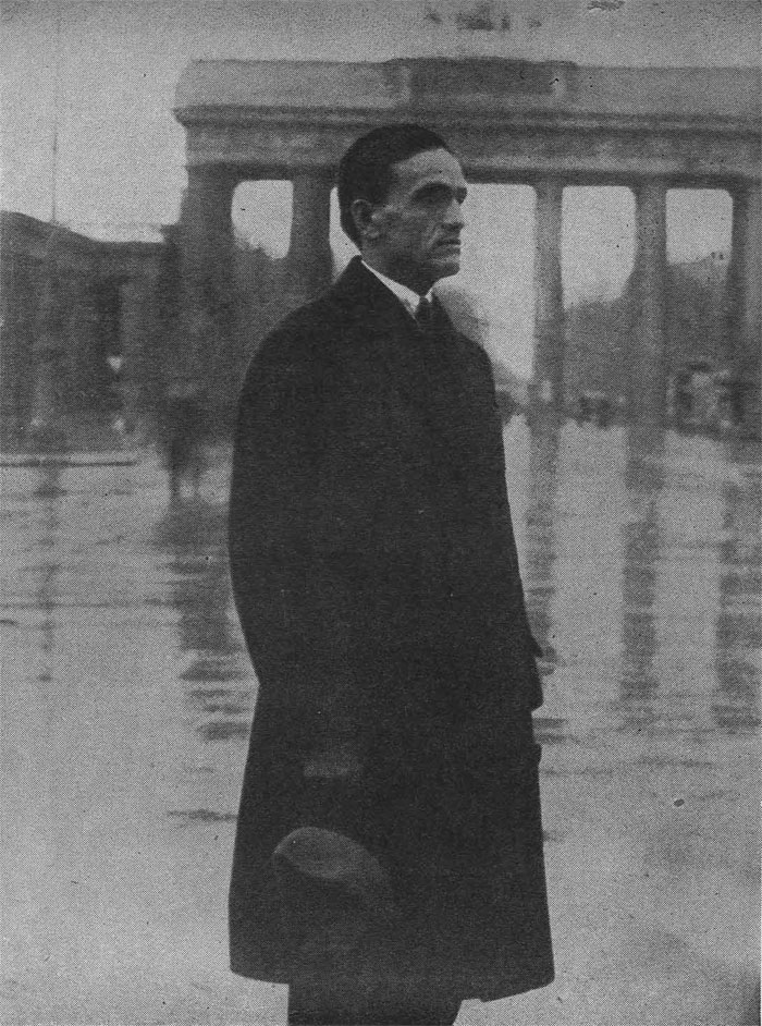 El poeta peruano César Vallejo frente a la Puerta de Brandenburgo, Berlín